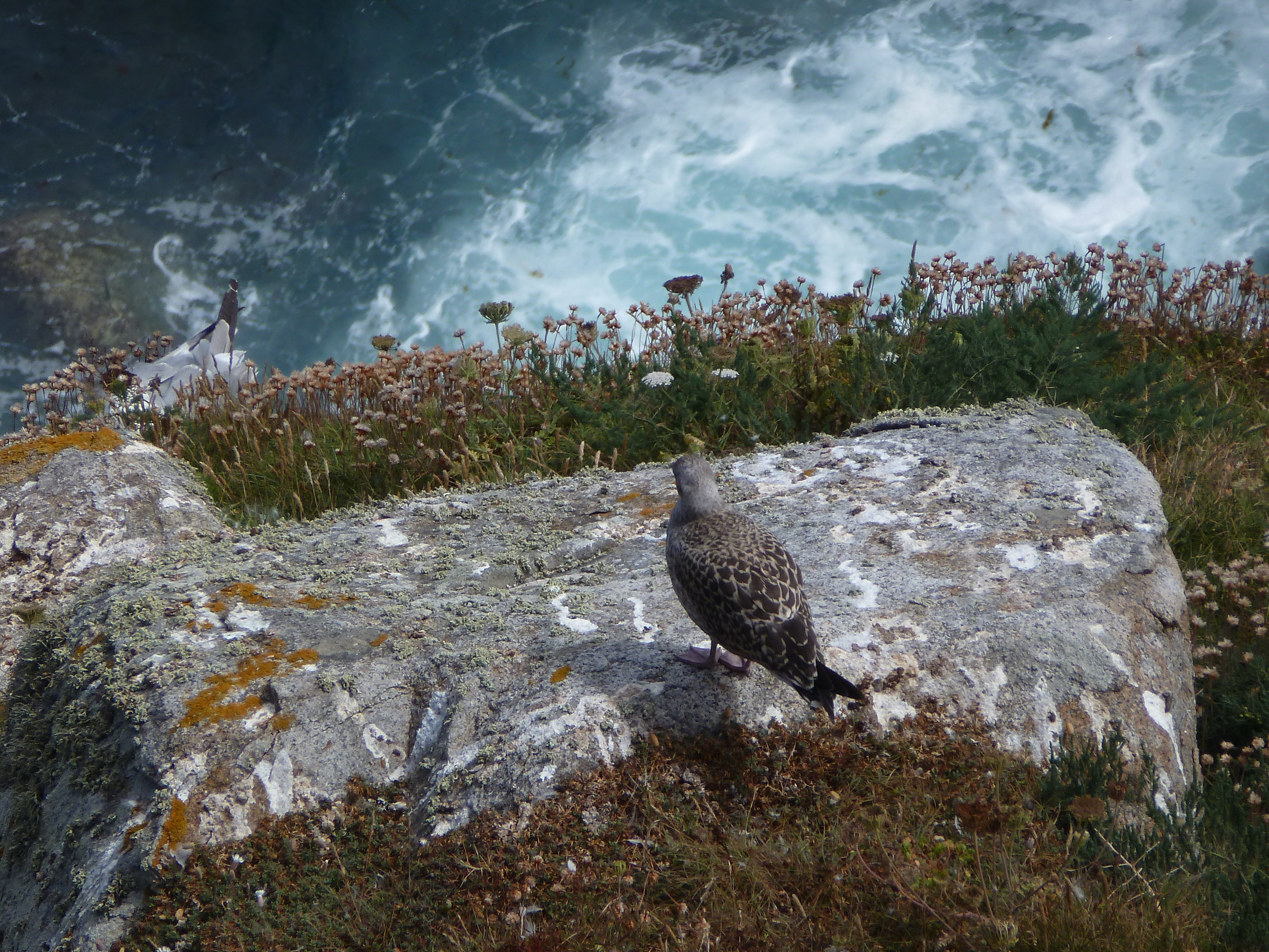 Goéland juvénile à Faro da Estaca de Bares